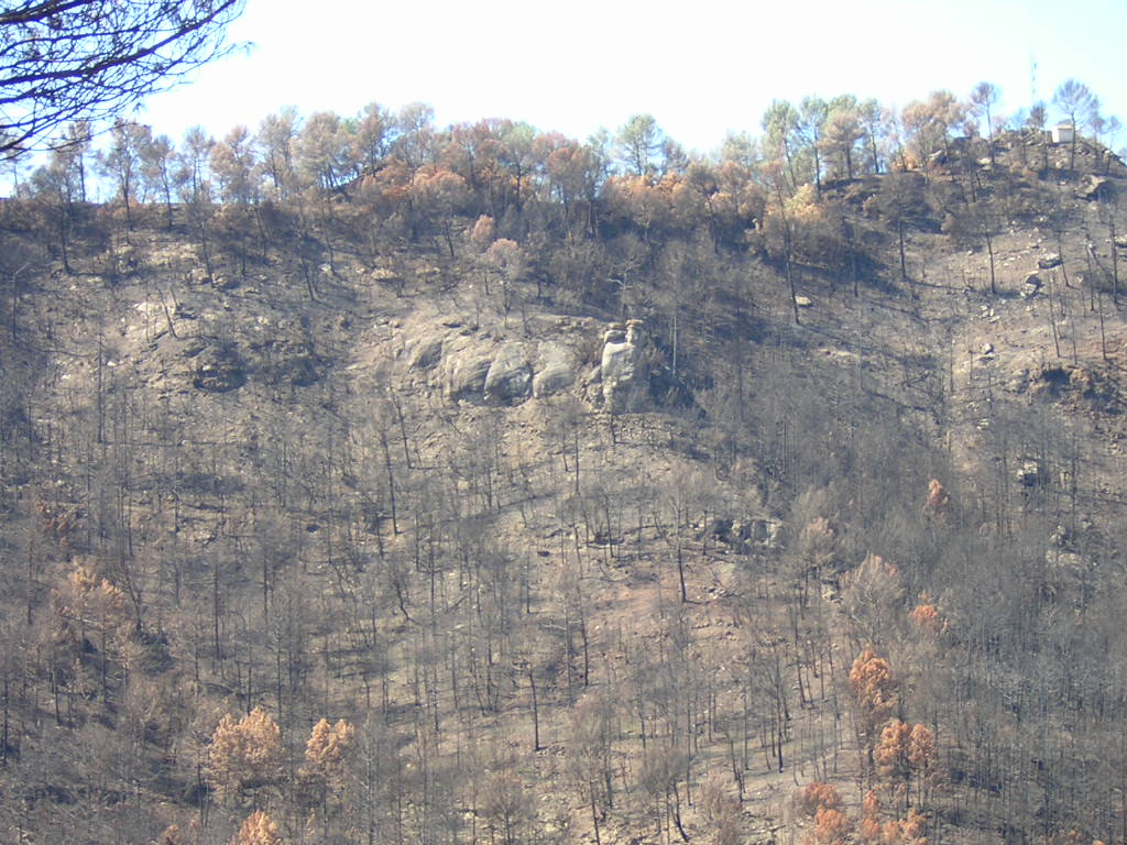 El Codro Barret (Monistrol de Calders, Moianès)